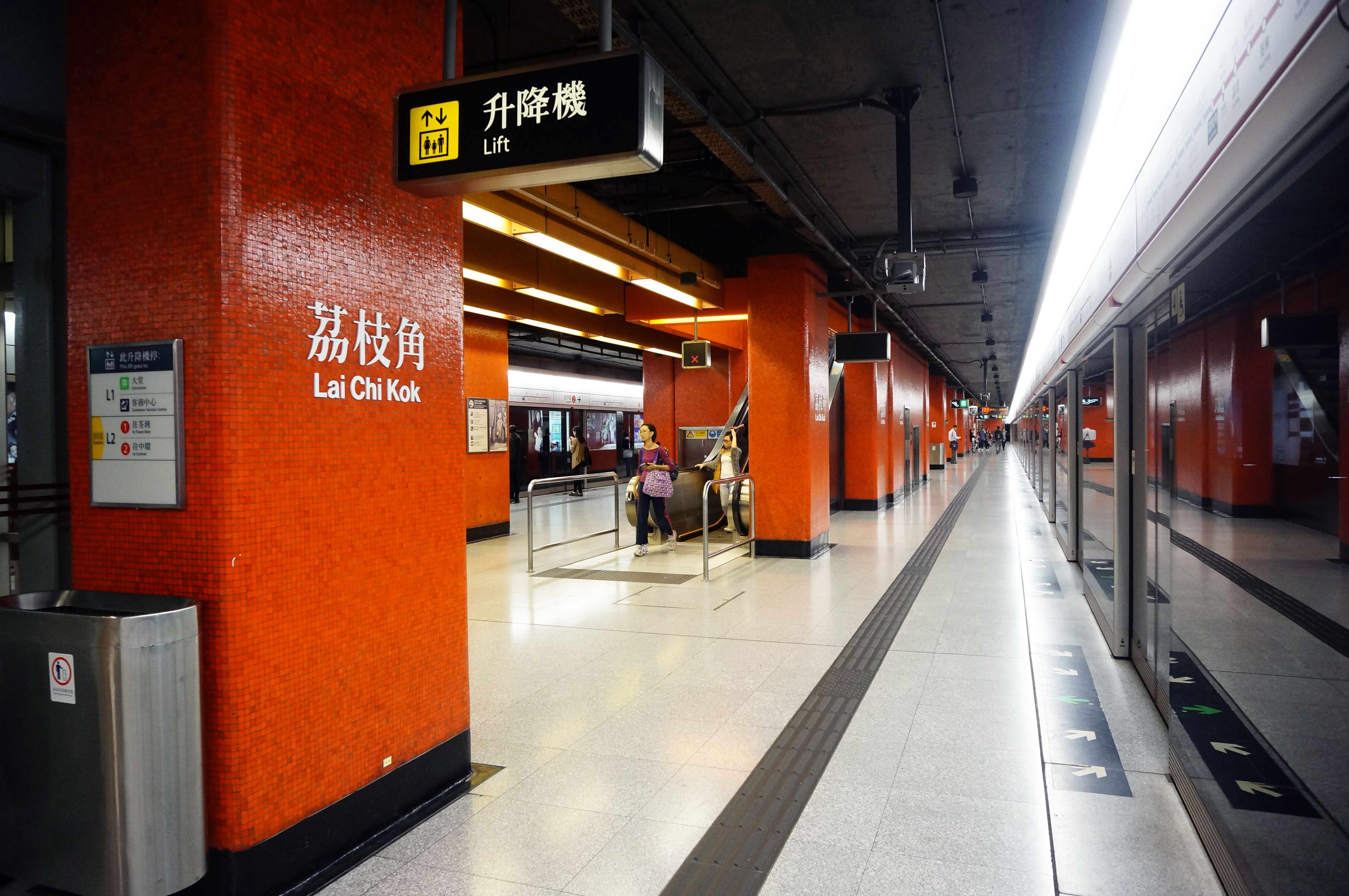 港鐵荔枝角站月台